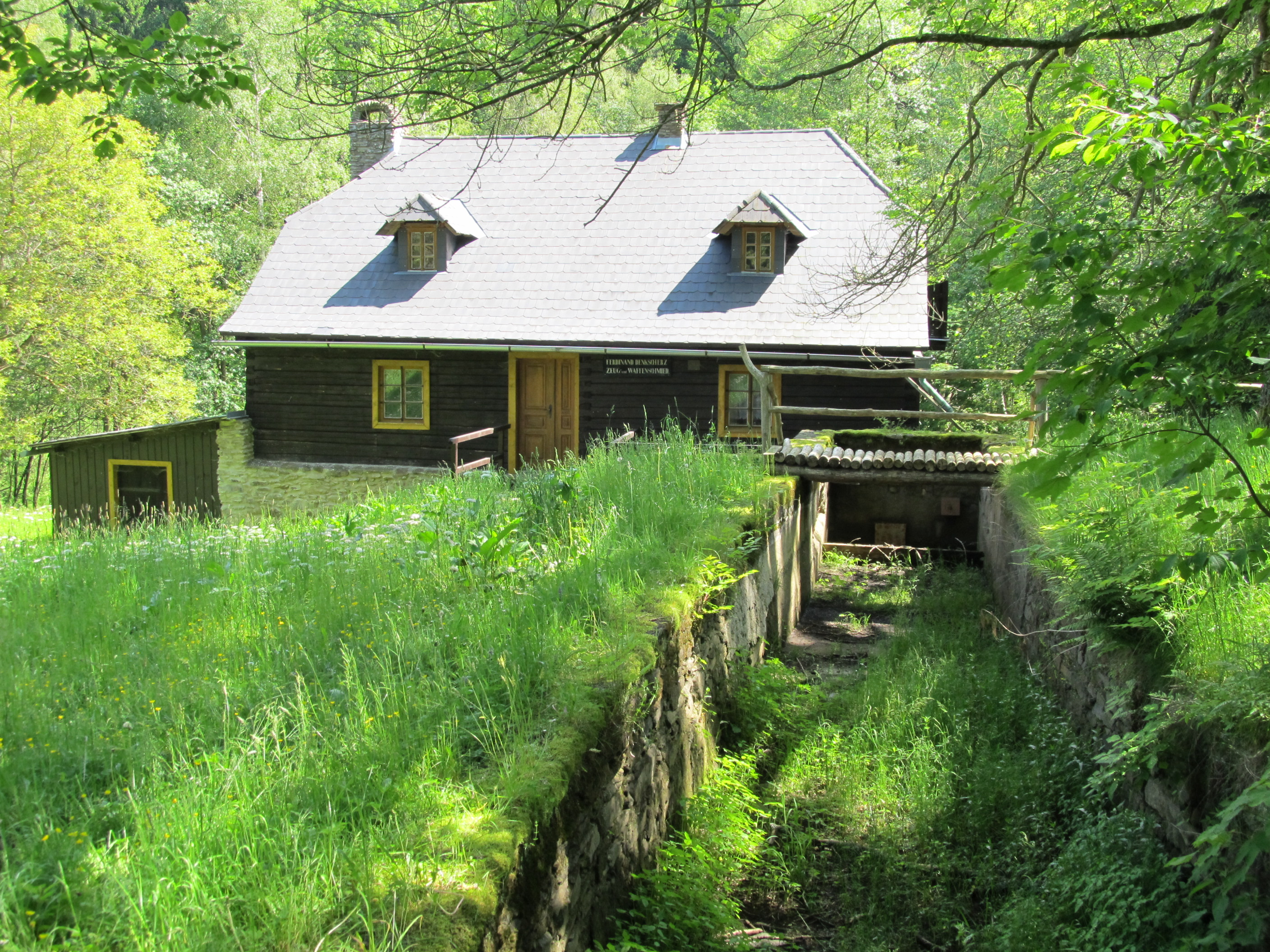 Městiště - Denkschertzův hamr